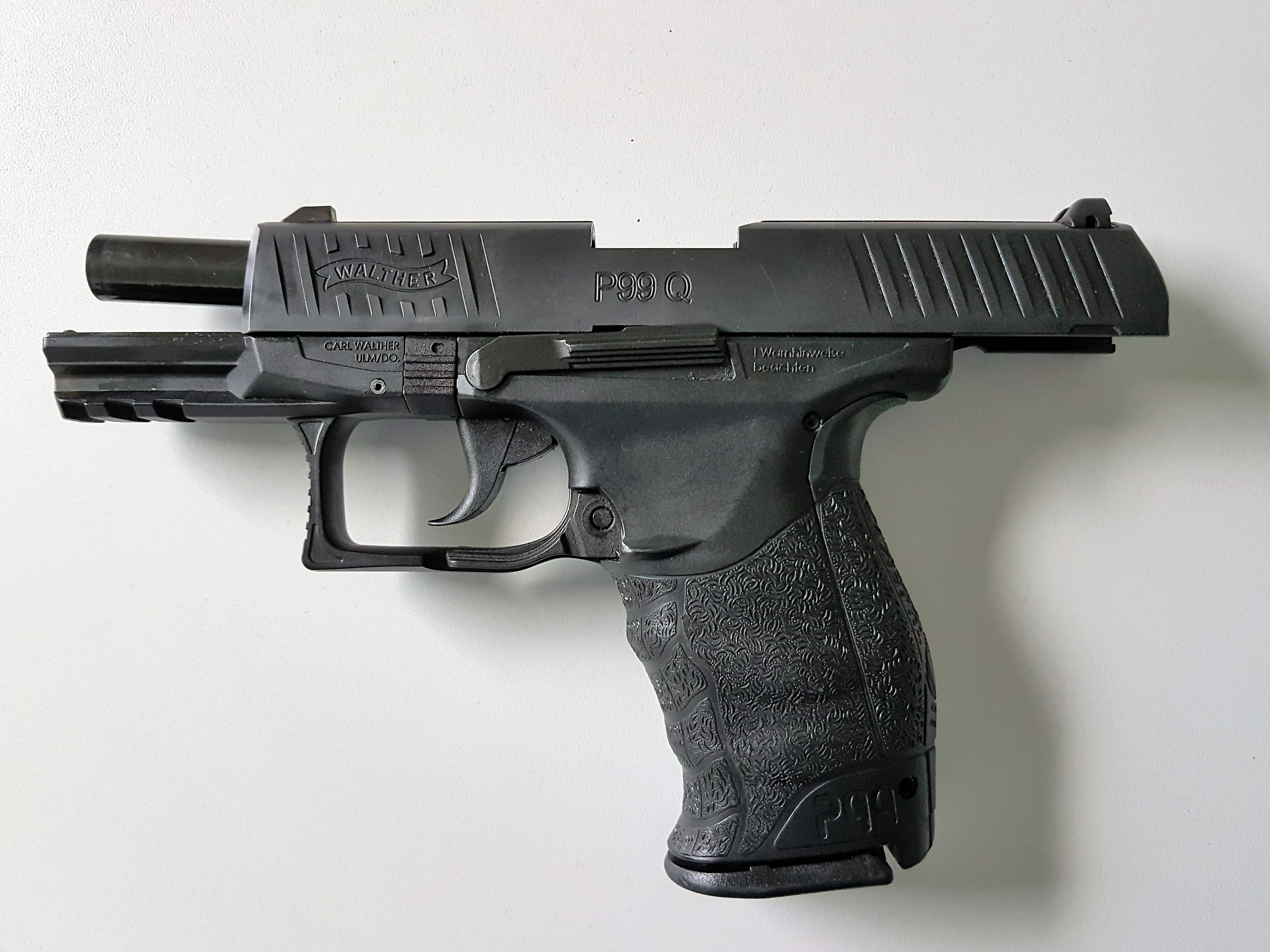 Die Walther P99Q mit arretierten Verschluss